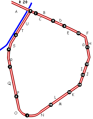 Schéma de la petite ceinture de Bruxelles. Version avec chiffres et lettres. Créé à partir de : Image:PetCeintureBruxelles.png de Utilisateur:Pypaertv